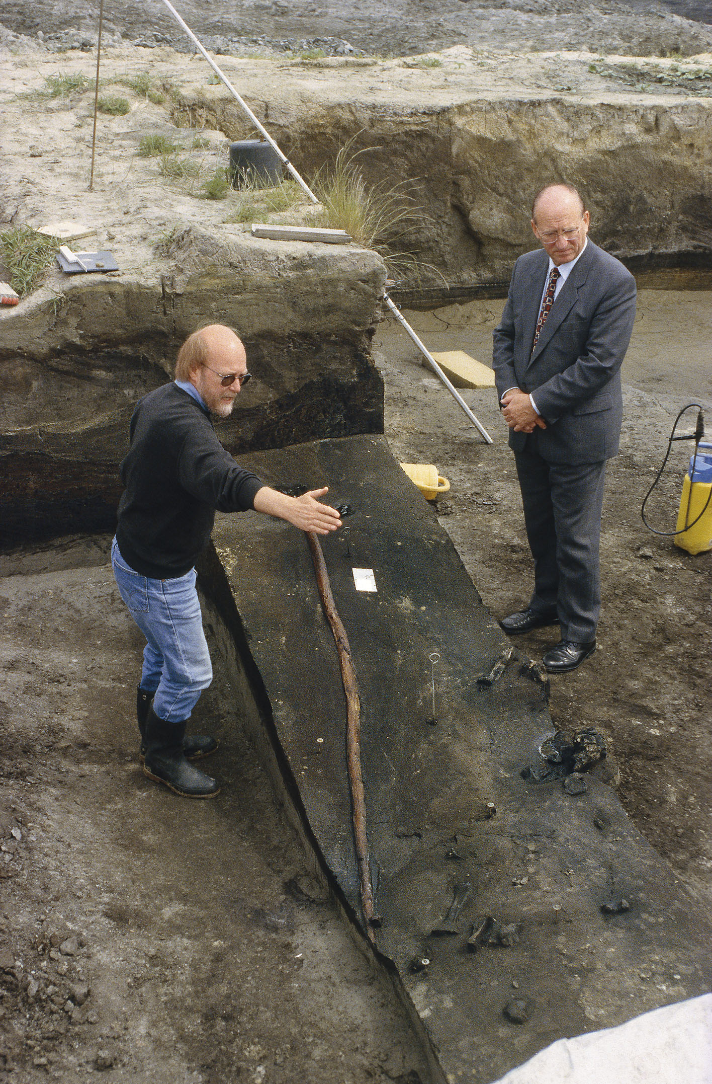 Ausgräber Dr. H. Thieme erklärt Speer VI in Fundlage